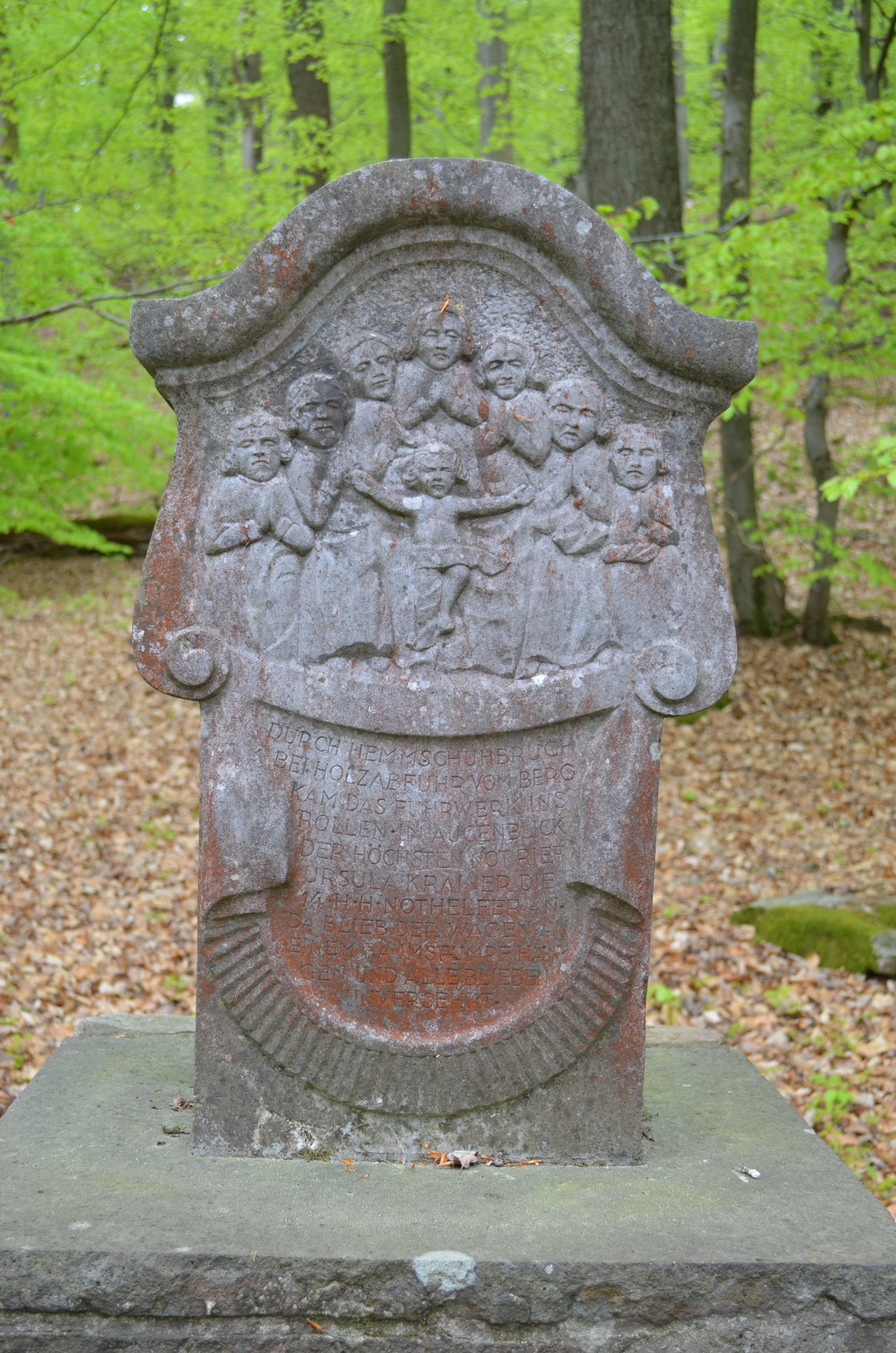 Königstein, Kreuzweg Romberg, Station 12, Links, Detail